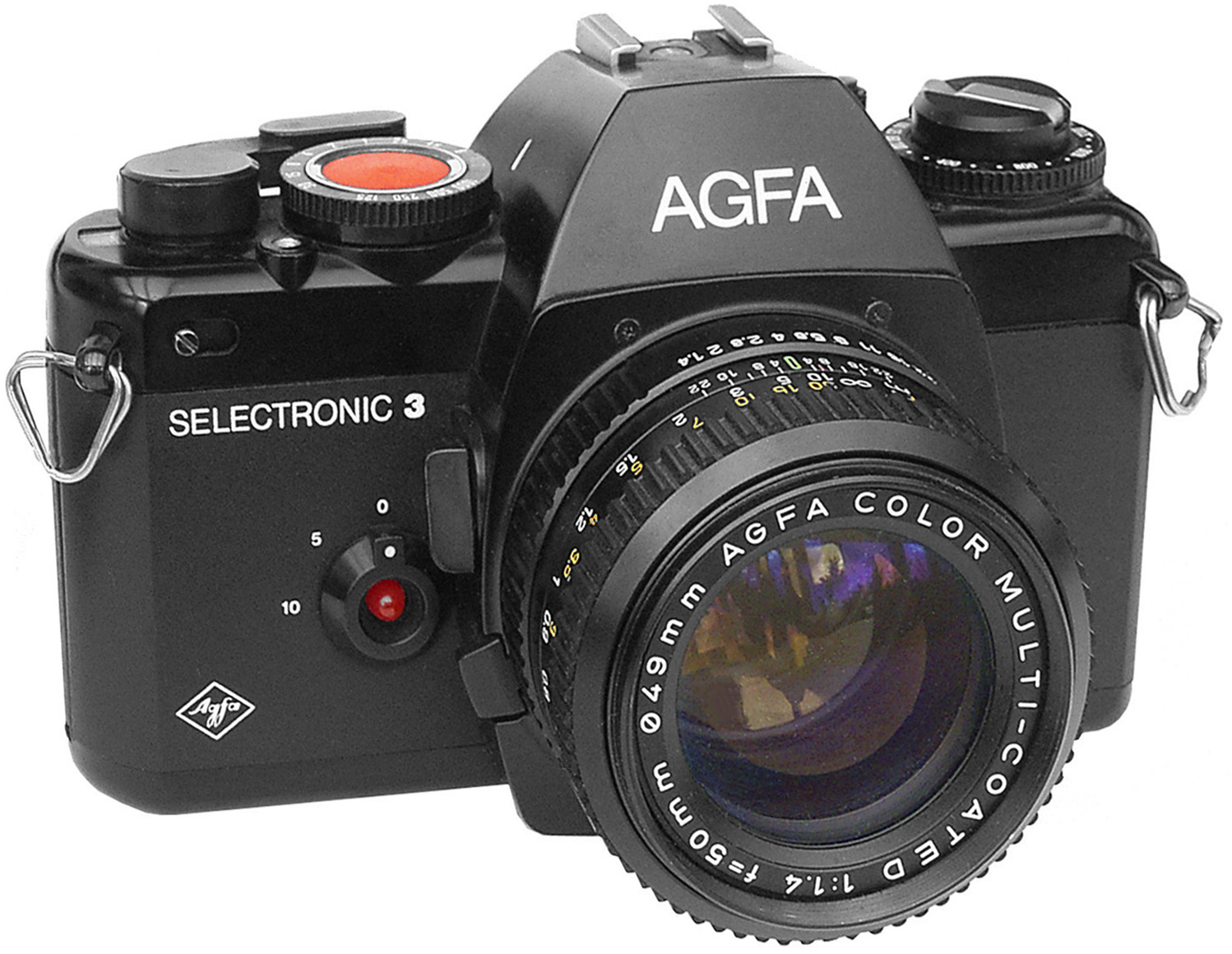 1980 griff Agfa noch einmal ins SLR-Geschäft ein und ließ von Chinon in Japan 3 schöne Spiegelreflexkameras fertigen: die Selectronic 1, Selectronic 2 und diese Selectronic 3. Die Selectronic 3 war das Spitzenmodell und entsprach der Chinon CE-4, war aber gefälliger und mit dem berühmten roten Sensor-Auslöser versehen. Sie hatte eine abschaltbare Zeitautomatik, die Zeiten von 8 Sek. bis 1/1000 Sek. wurden im Sucher per LED angezeigt. Man konnte auch einen Winder anschließen. Alles in allem eine schöne kompakte Kamera, versehen mit dem verbreiteten Pentax-K-Bajonett. Agfa stellte auch selber ein paar Objektive mit eigenem Label – gefertigt von Chinon – dazu zur Verfügung. Das Fotoversandhaus "Quelle" ließ sich übrigens dieses Modell als AC 2 von Chinon herstellen. Leider war auch dieser Kraftakt nicht mehr von Erfolg beschieden, 1983 stellte Agfa die Kameraproduktion ein.